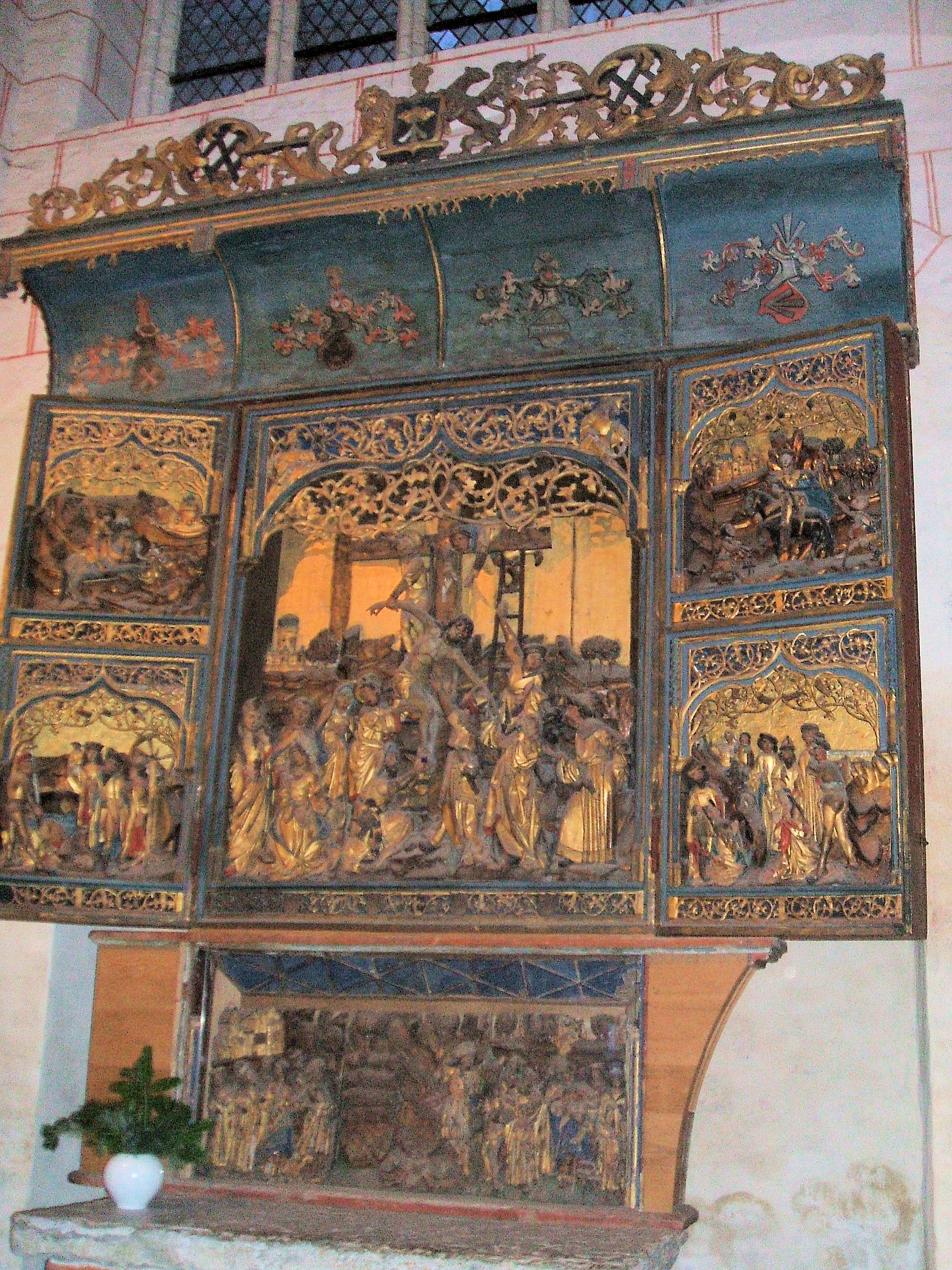 Bürgermeister-Altar in der Stralsunder Nikolaikirche